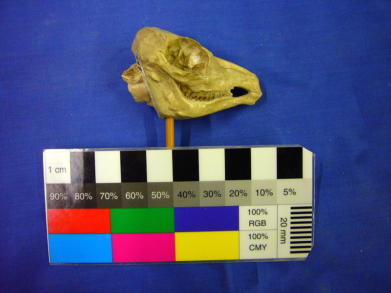 Hypisodus minimus skull